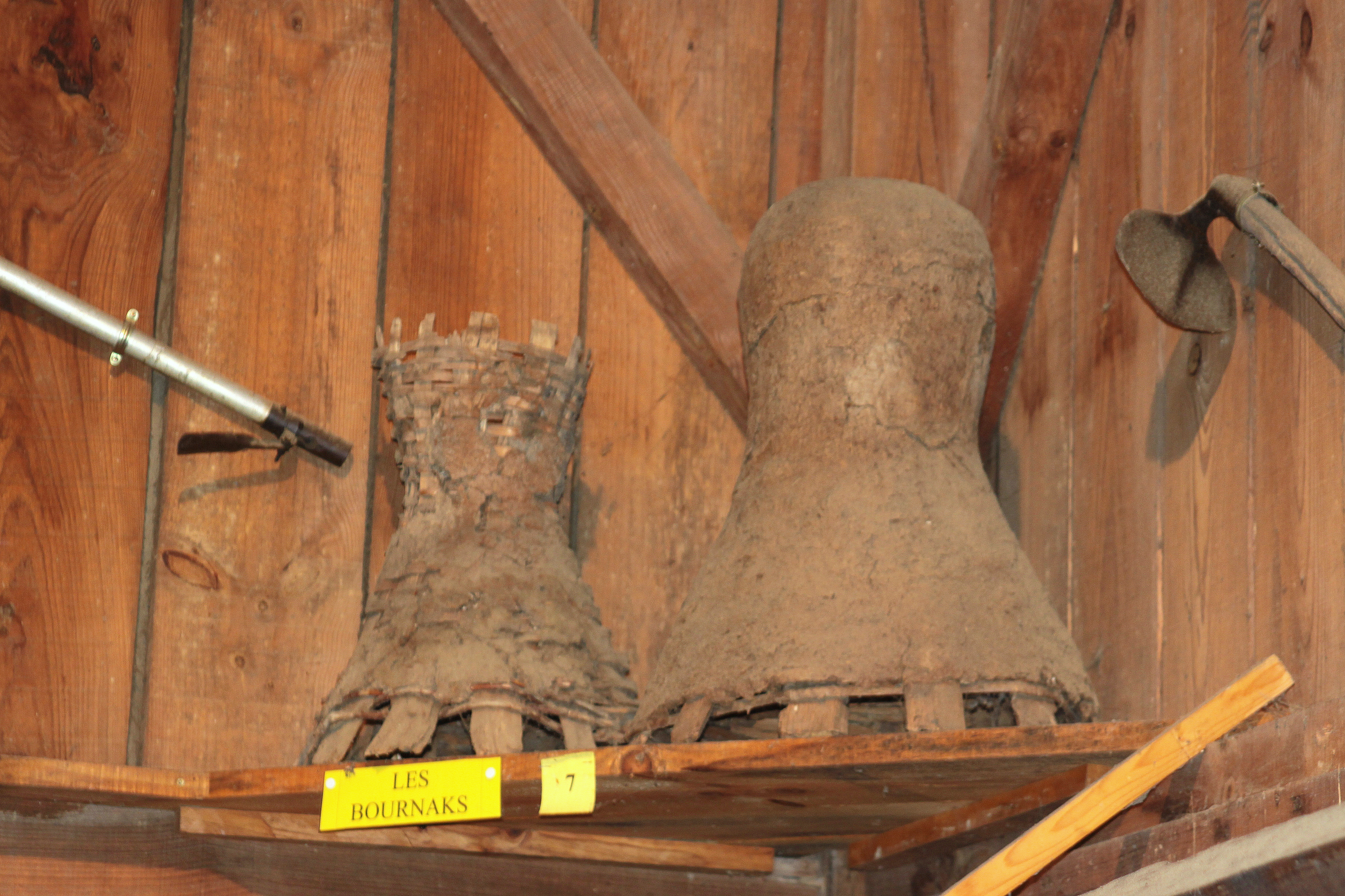 Bournaks au musée agricole du Ginx (commune Arue) dans les Landes.